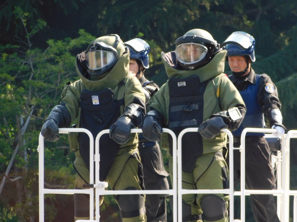 警視庁機動隊の爆発物処理班。2017年機動隊観閲式で撮影。